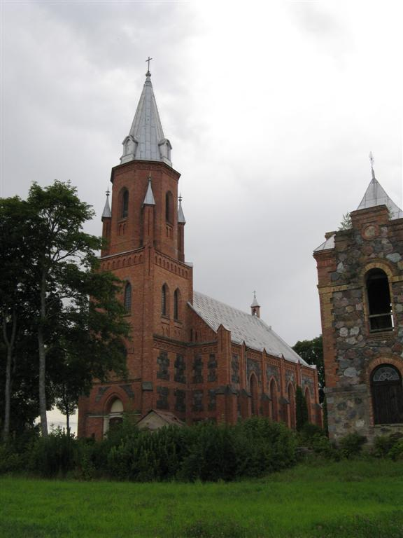 Panemunio Švč. Trejybės bažnyčia